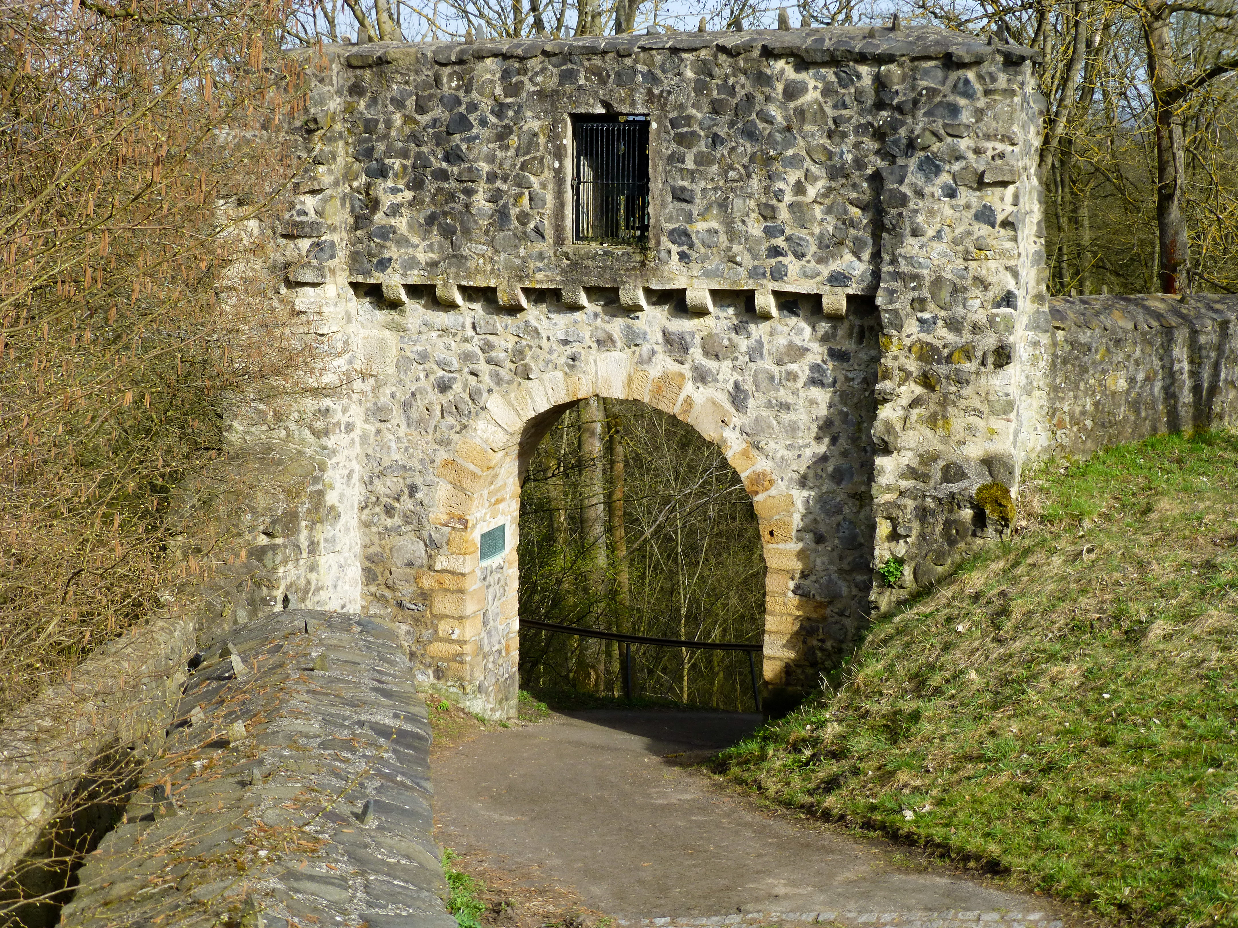 Burg Heiligenberg; Burgtor von der Burgseite gesehen; in der Mauernische über dem Durchgang hängt die Glocke der Heimat